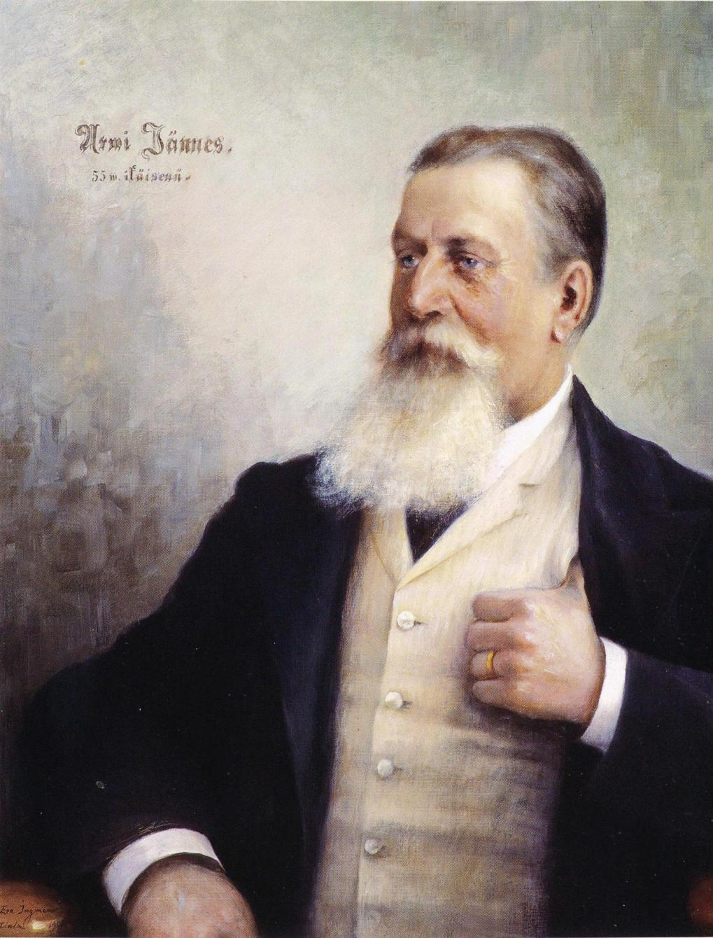 Eva Ingmanin maalaama muotokuva runoilija ja kielentutkija Arvid Genetzistä (Arvi Jännes, 1848–1915). Maalauksen omistaa Suomalaisen Kirjallisuuden Seura